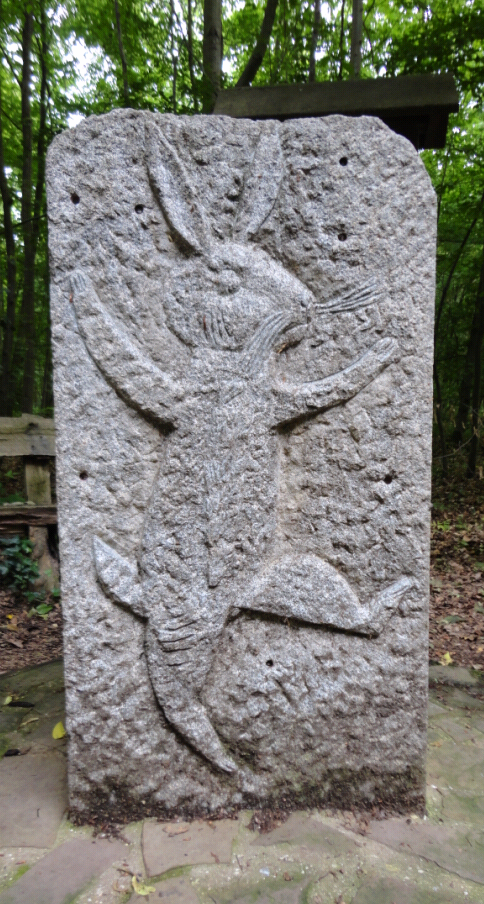 Das Bild zeigt eine Nachschöpfung eines frühen Hasendenkmals, das volkstümlich der "Siebenschuss" genannt wurde.